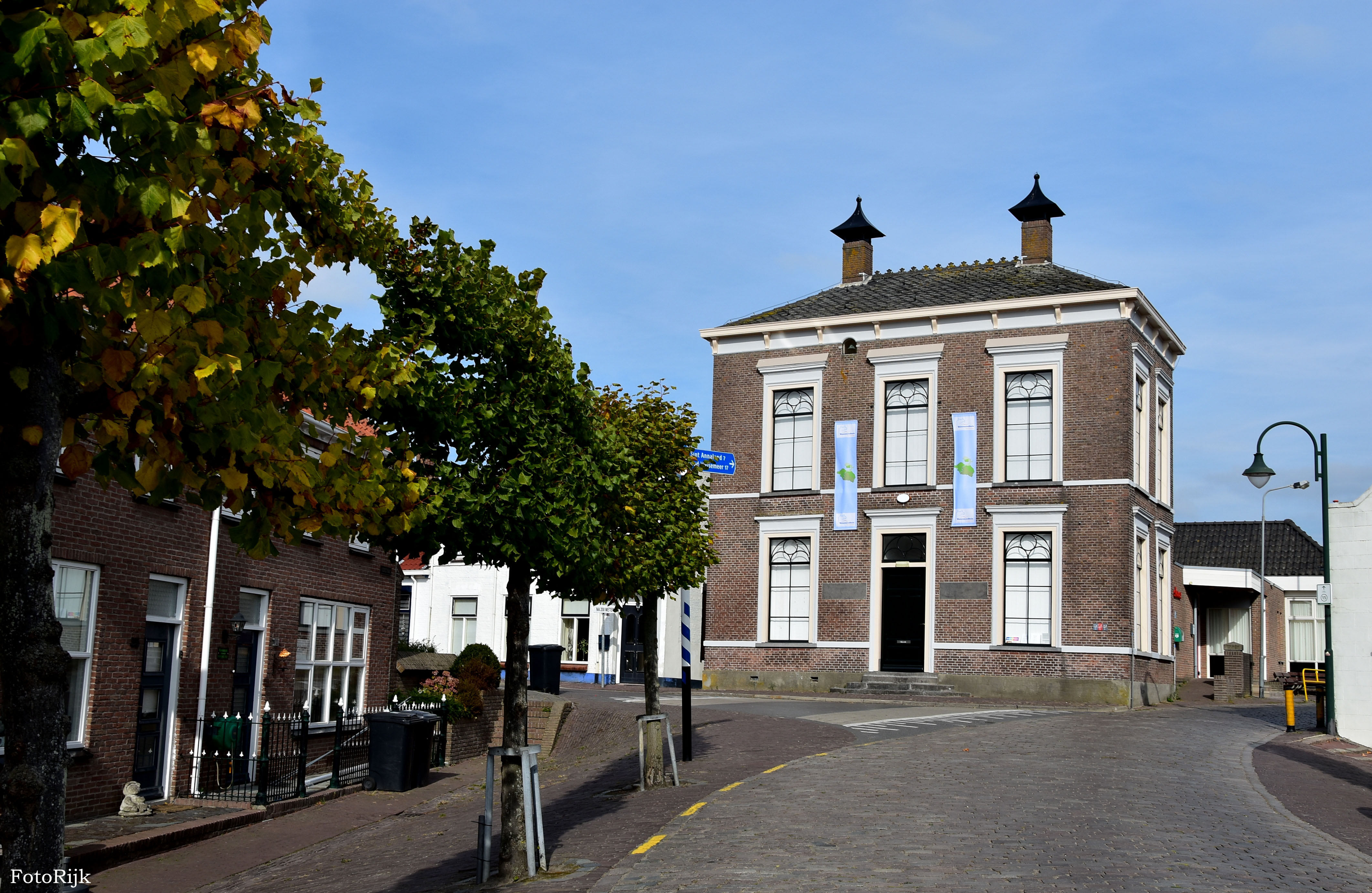 voorzijde gemeentehuis